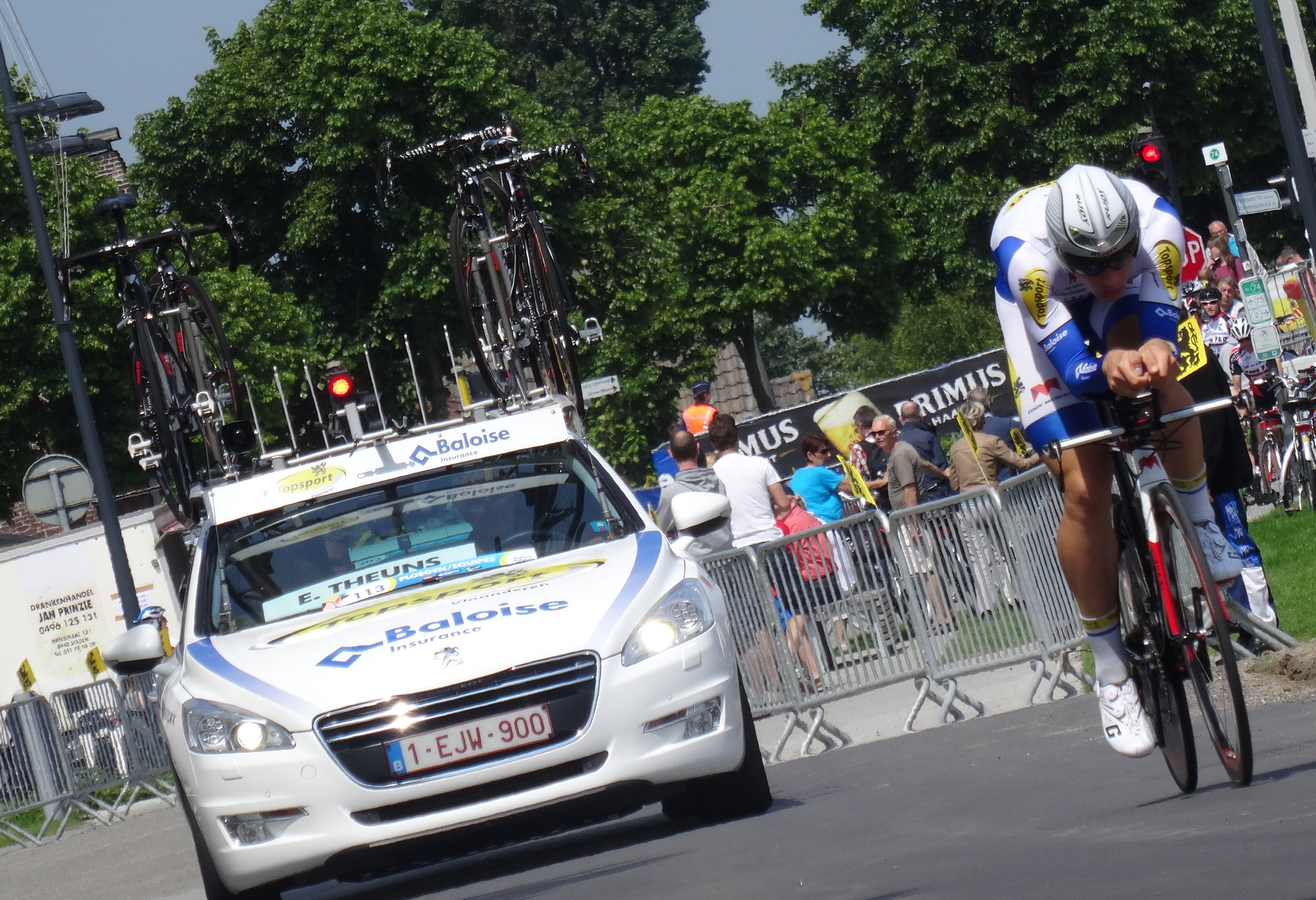 Reportage photographique réalisé le vendredi 30 mai à l'occasion du contre-la-montre individuel de la troisième étape du Tour de Belgique 2014 à Dixmude, Belgique.